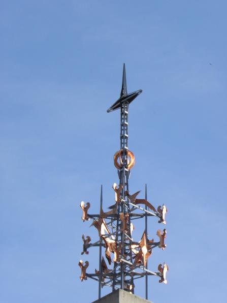 Ronde des anges du campanile de l'église N.D. de l'Annonciation de Lyon (69)